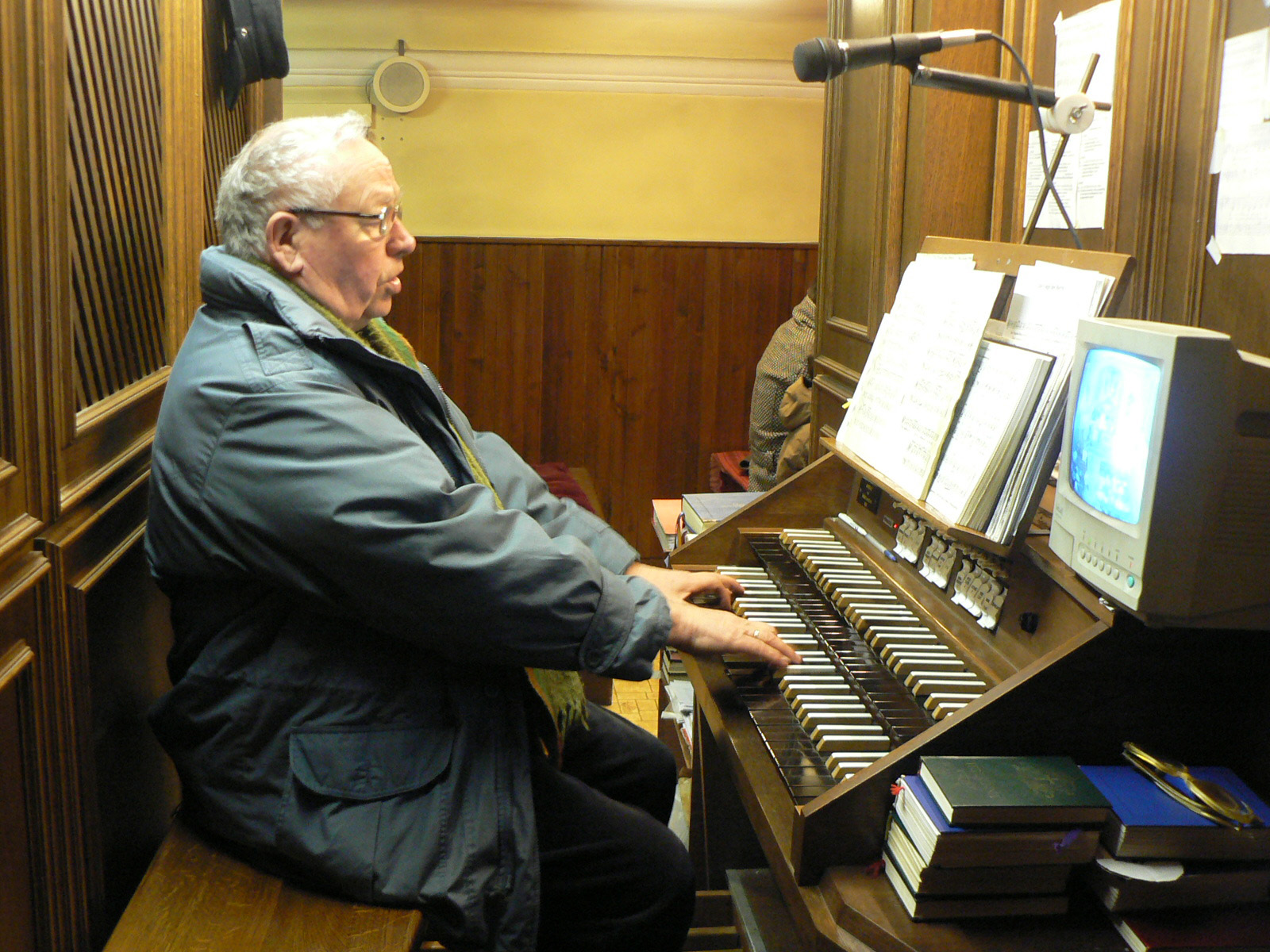 Neubrandt Ferenc orgonál a pilisszentiváni templomban